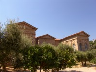 Porfiriada at Karlovassi